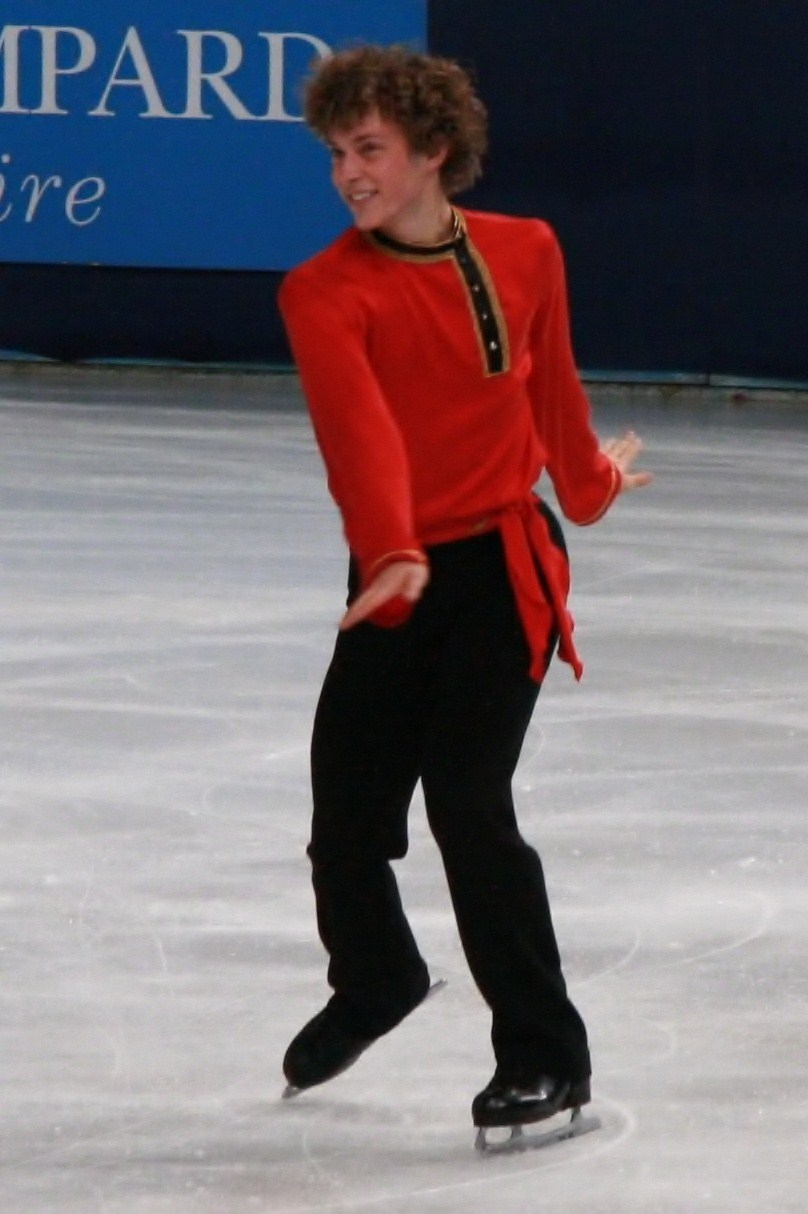 Адам Риппон на 2011 Trophée Eric Bompard